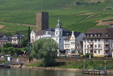 Rüdesheim